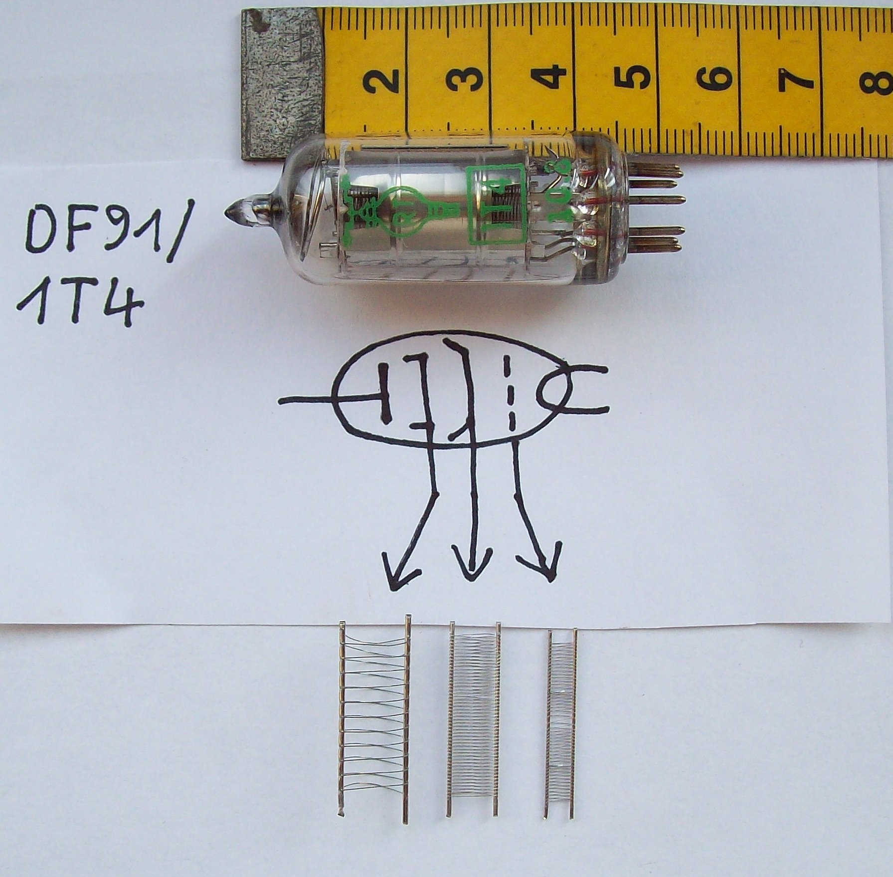 Zerlegte DF91.